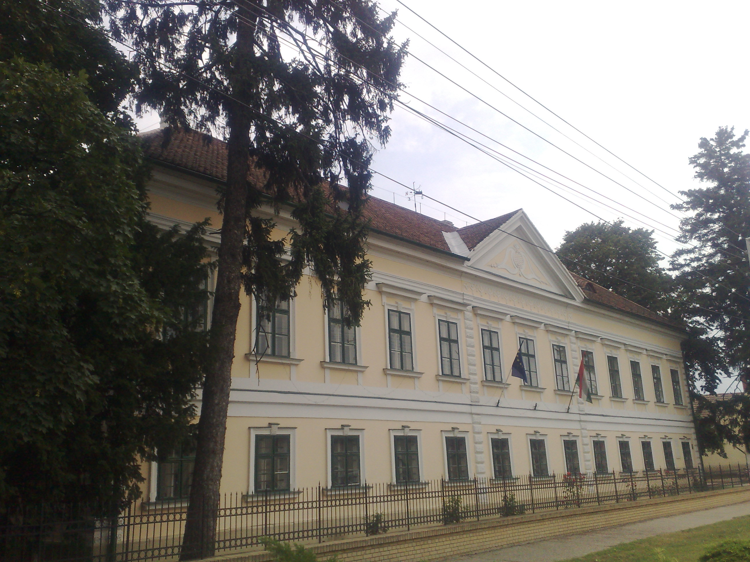 Szany - a püspöki kastély az udvar felől